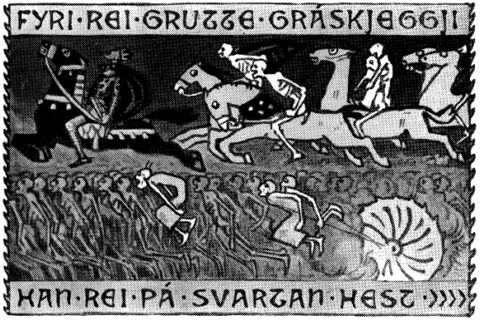 fyri rei Grutte gråskjeggji i Draumkvedet Lasta ned frå HiT-Notodden. Kunstnaren har vori død i over 70 år = fritt frå opphavsrettvernet (PD)